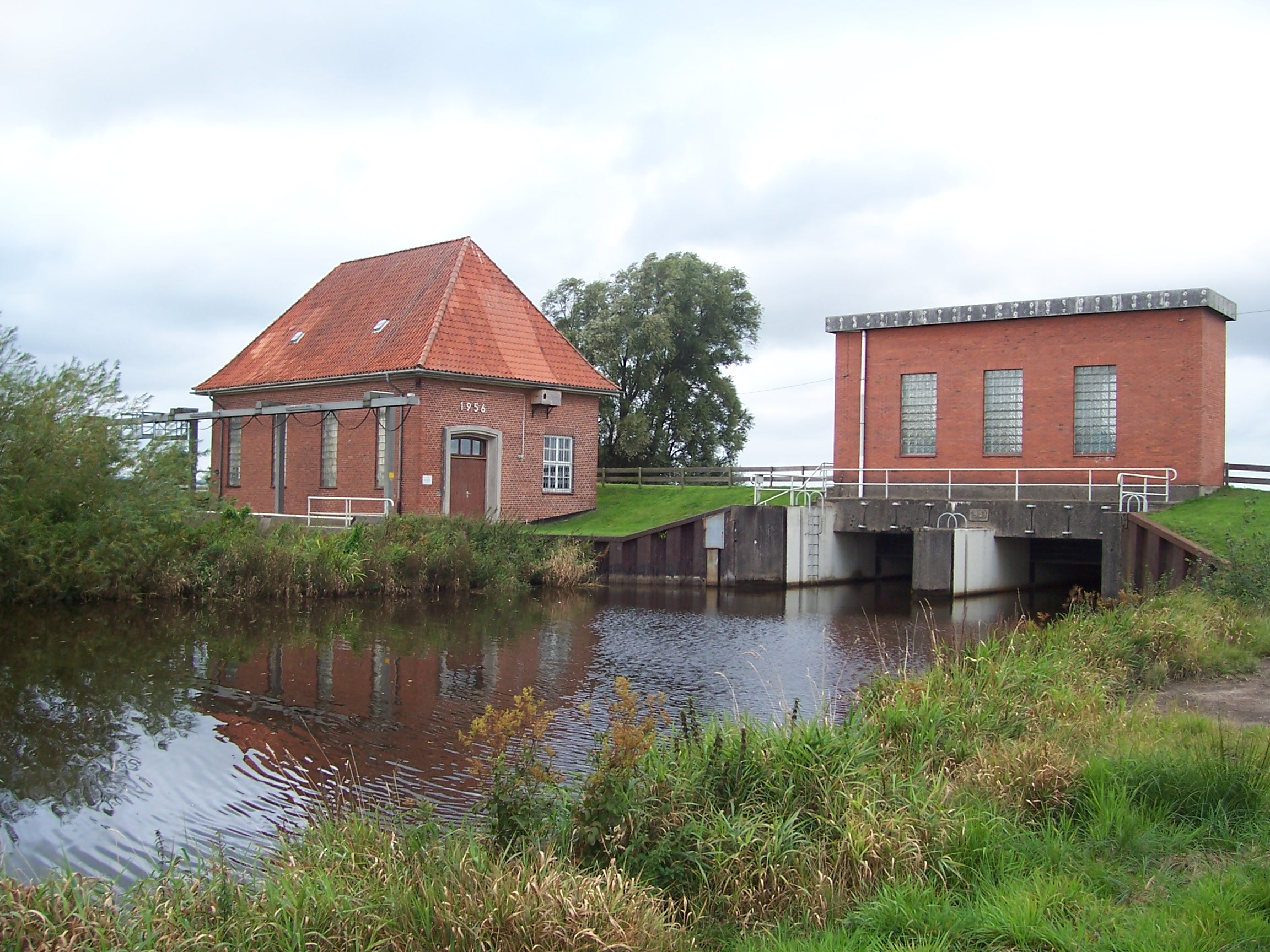 Mehe-Schöppwark twischen Brobargen un Nindörp